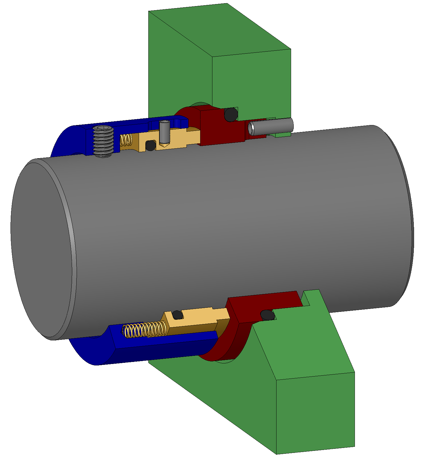 Schnitt durch eine drehrichtungsunabhaengige, einfachwirkende Gleitringdichtung .